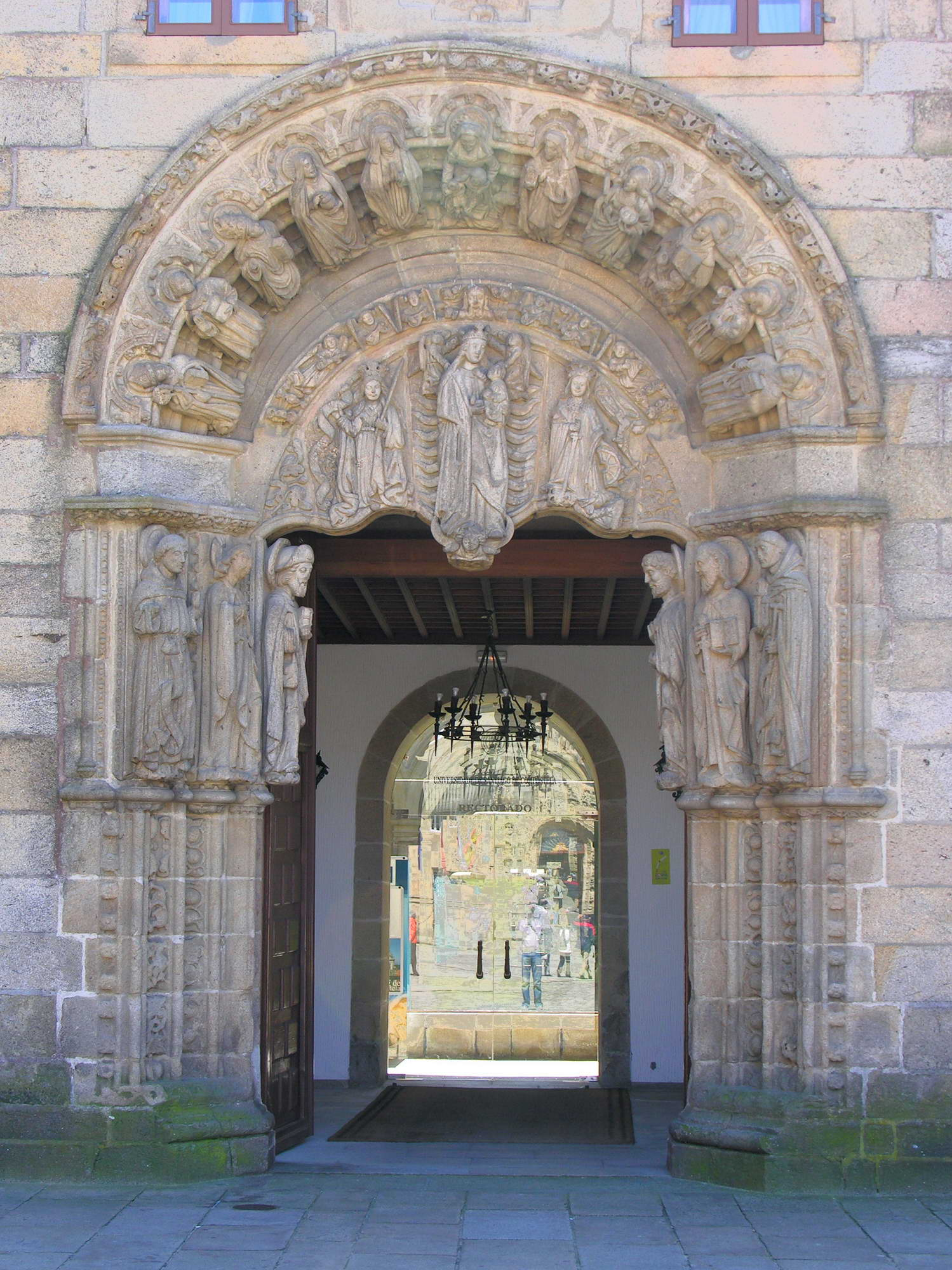 self made. Santiago de Compostela, Galicia, Spain.